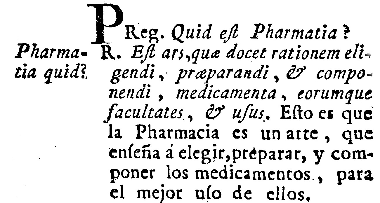 definicion farmacia en cartilla